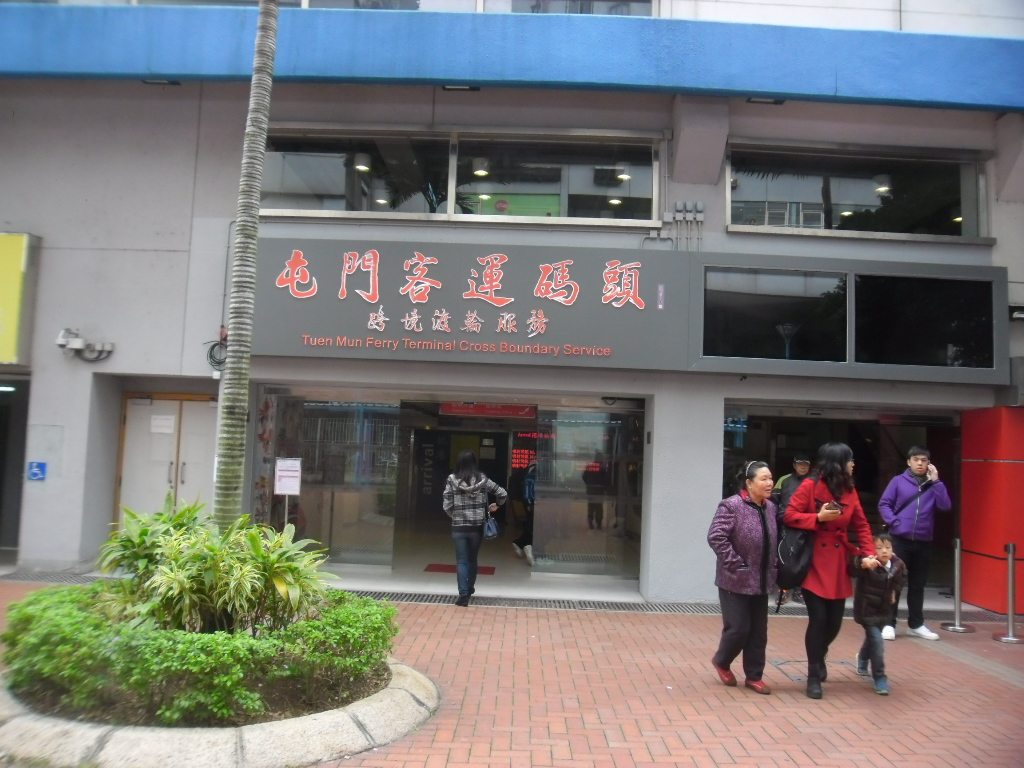 中文（香港）: 屯門渡輪碼頭西翼入口(2016年2月)